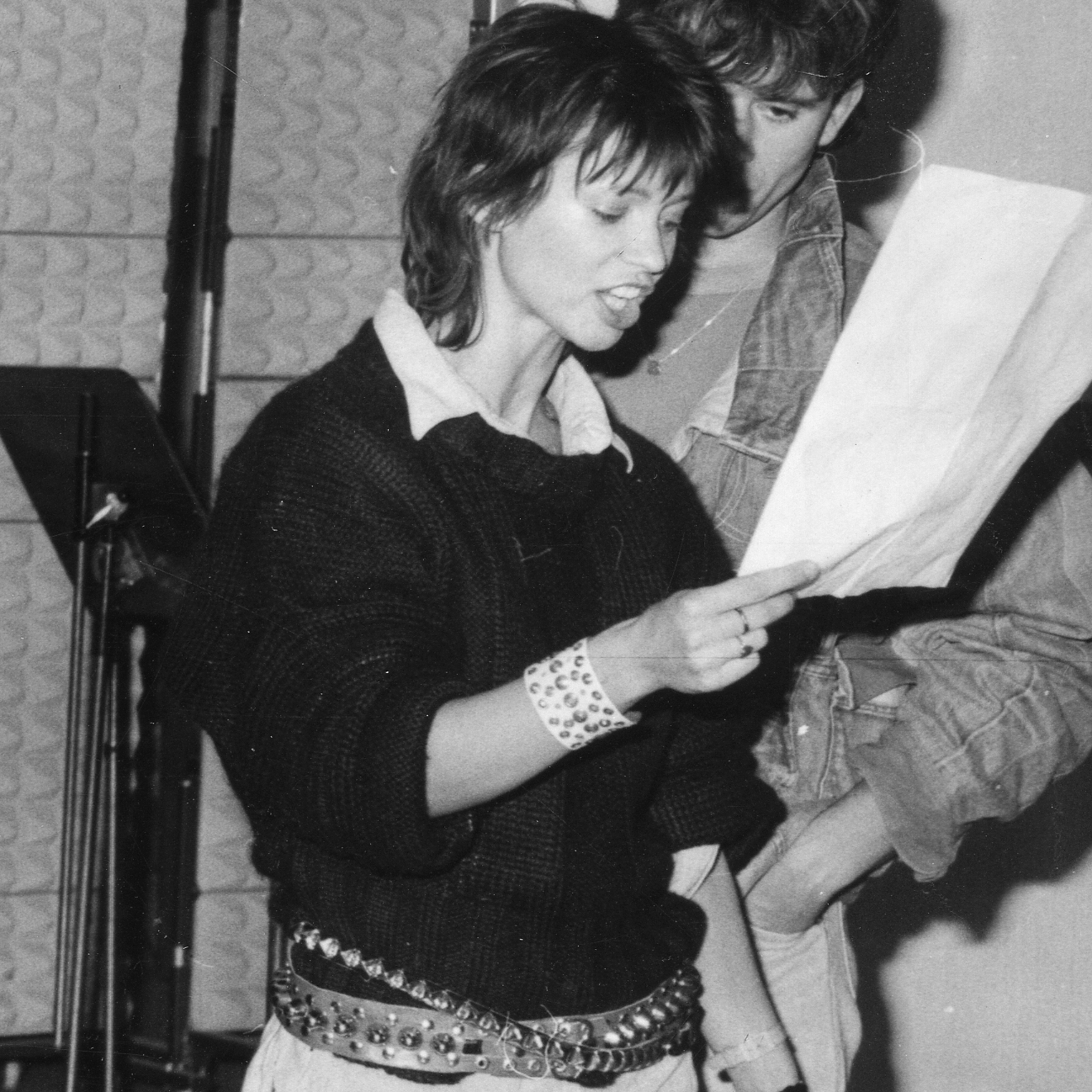 Előkészület a Sportsegély gálaestre 1986-ban: Benkő László, Komár László, Kiss Gabriella szerkesztő, Kovács Kati, Deák Bill Gyula, Görbe Nóra, Kiki (Első emelet)